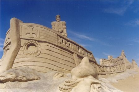 Maior projeto de escultura em areia realizado no Brasil no ano de 2000 para comemoração dos 500 anos do Descobrimento do Brasil. Projeto de autoria do escultor em areia Claudio L Nogueirol. Veja mais em